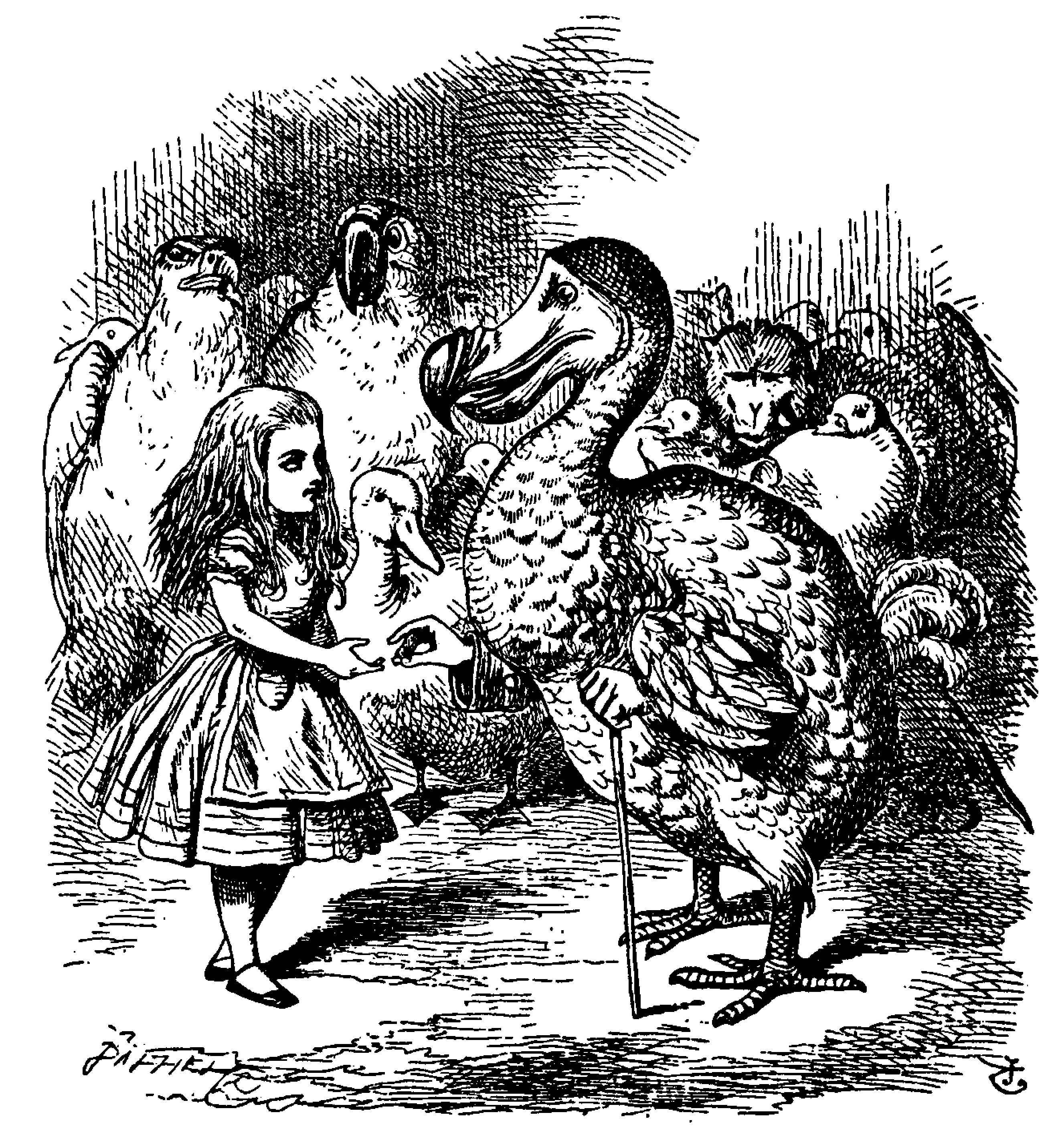 Alice’s Abenteuer im Wunderland Übersetzer: Antonie Zimmermann Orginal Titel: Alice's Adventures in Wonderland Illustrationen: John Tenniel